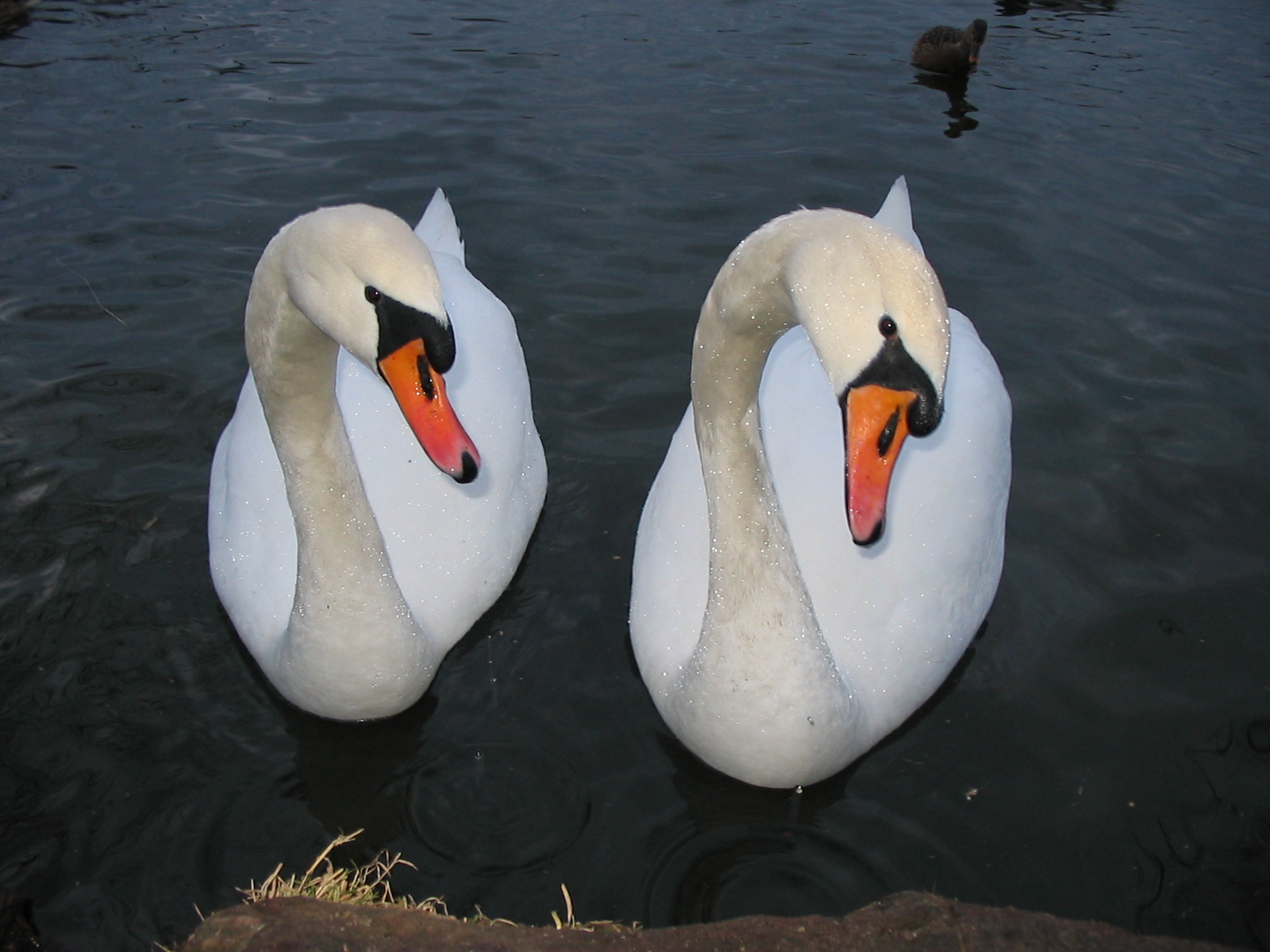 young swan pair, lake in Berlin, Germany